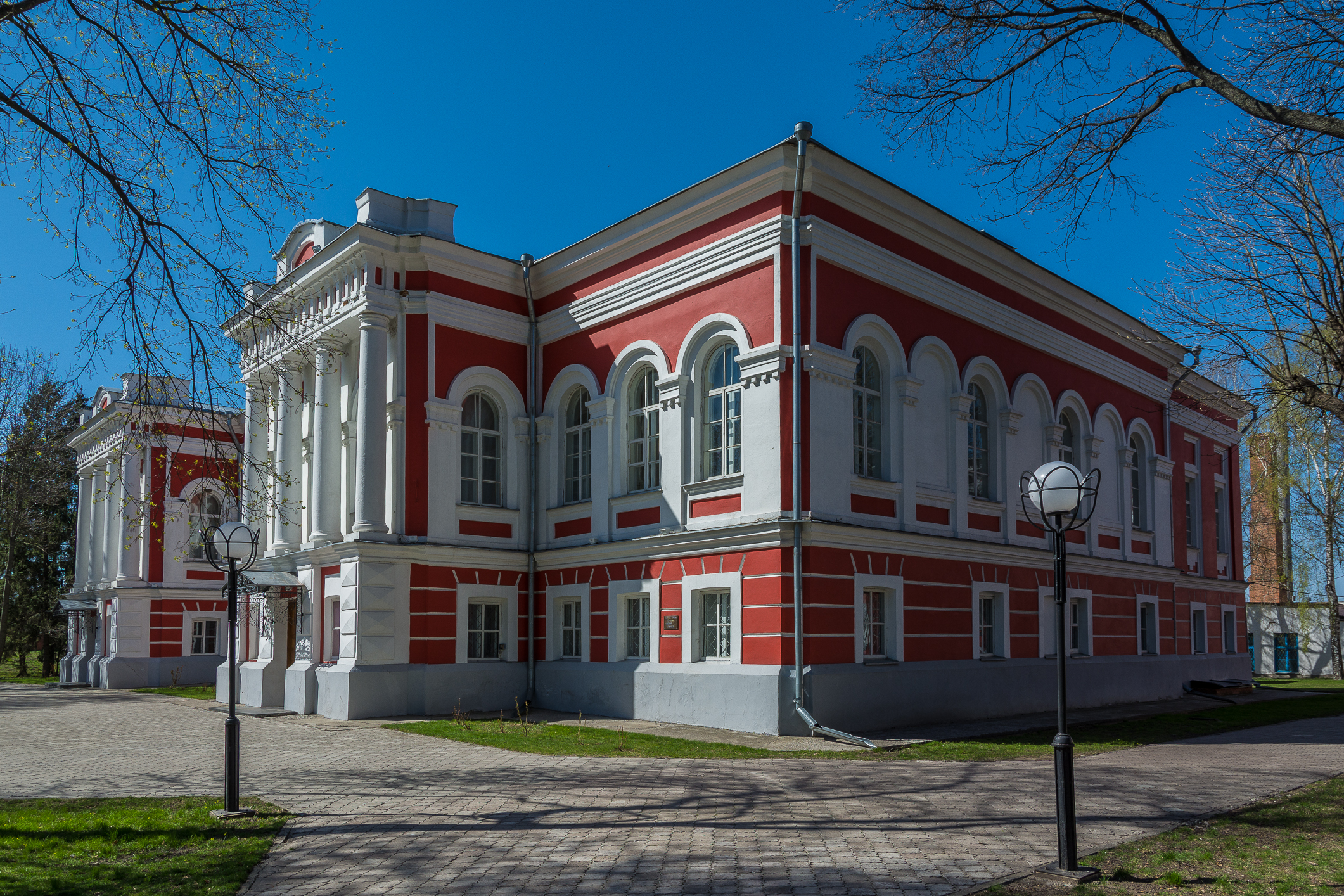 Глухівська чоловіча гімназія, Глухів, вул. Києво-Московська, 24